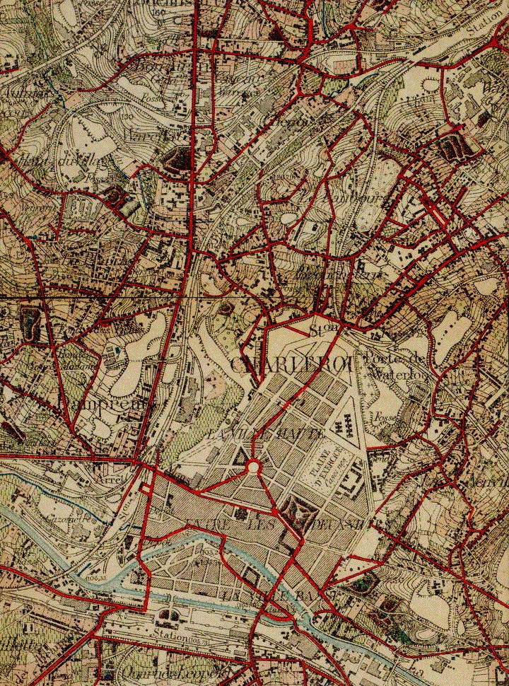 Carte topographique réalisée par le Dépôt de la Guerre de Belgique (DG), puis par l'Institut Cartographique Militaire (ICM). Troisième édition dite «Nouvelle édition topogravée» a été réalisée entre 1889 et 1900.